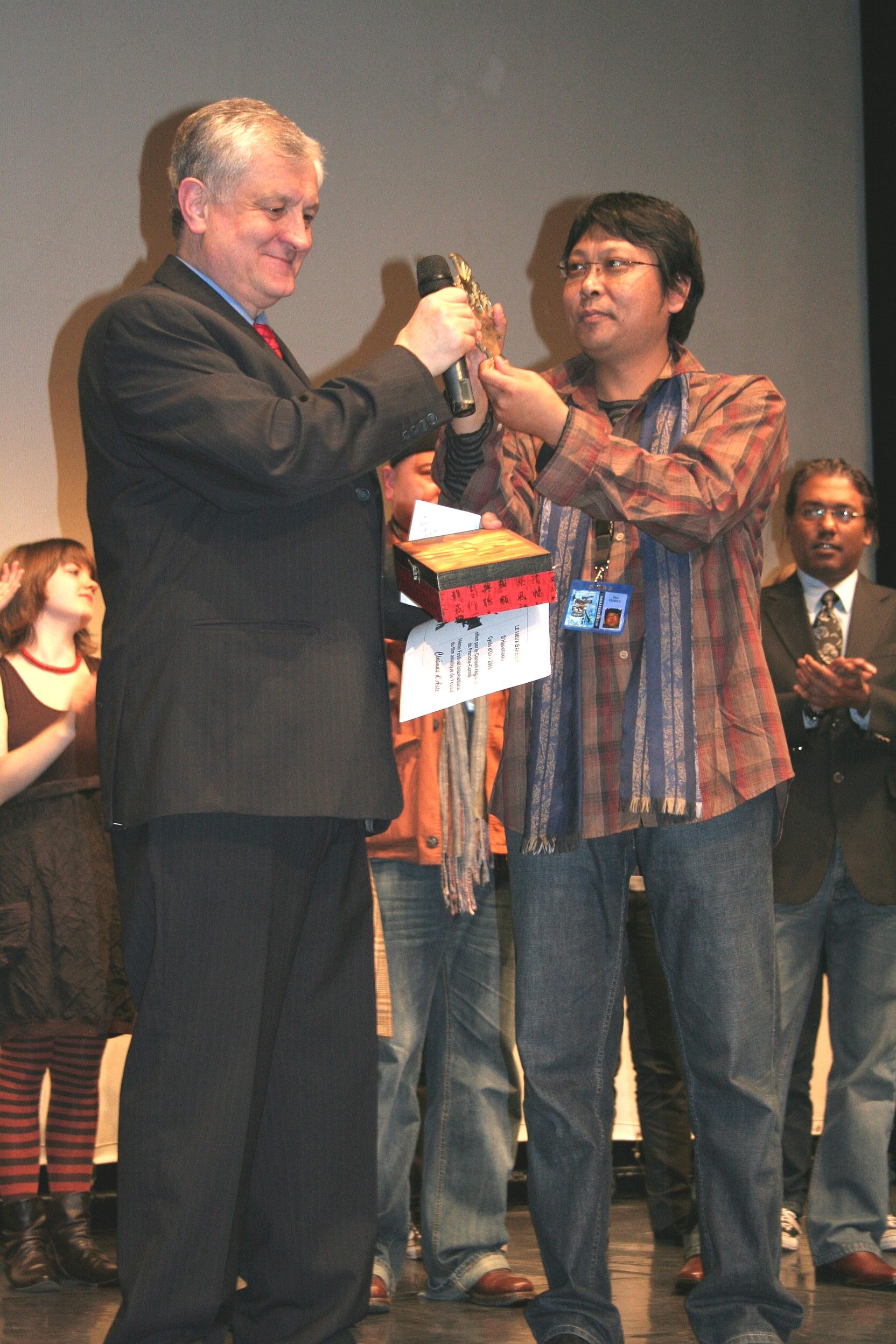 Remise du Cyclo d'or à Hasi Chaolu par Loic Niepceron